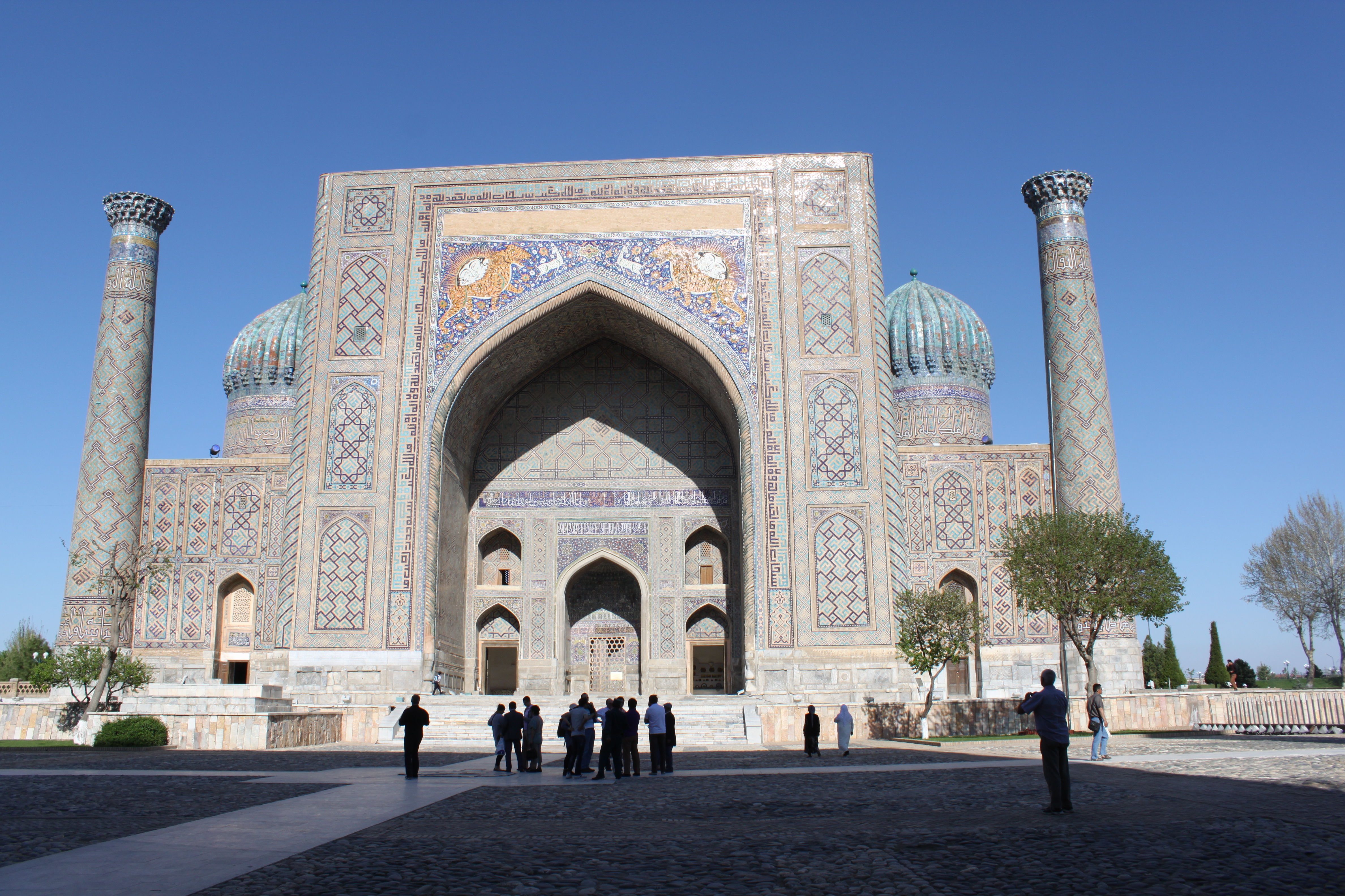 Vue extérieure de la madrasa Cher-Dor